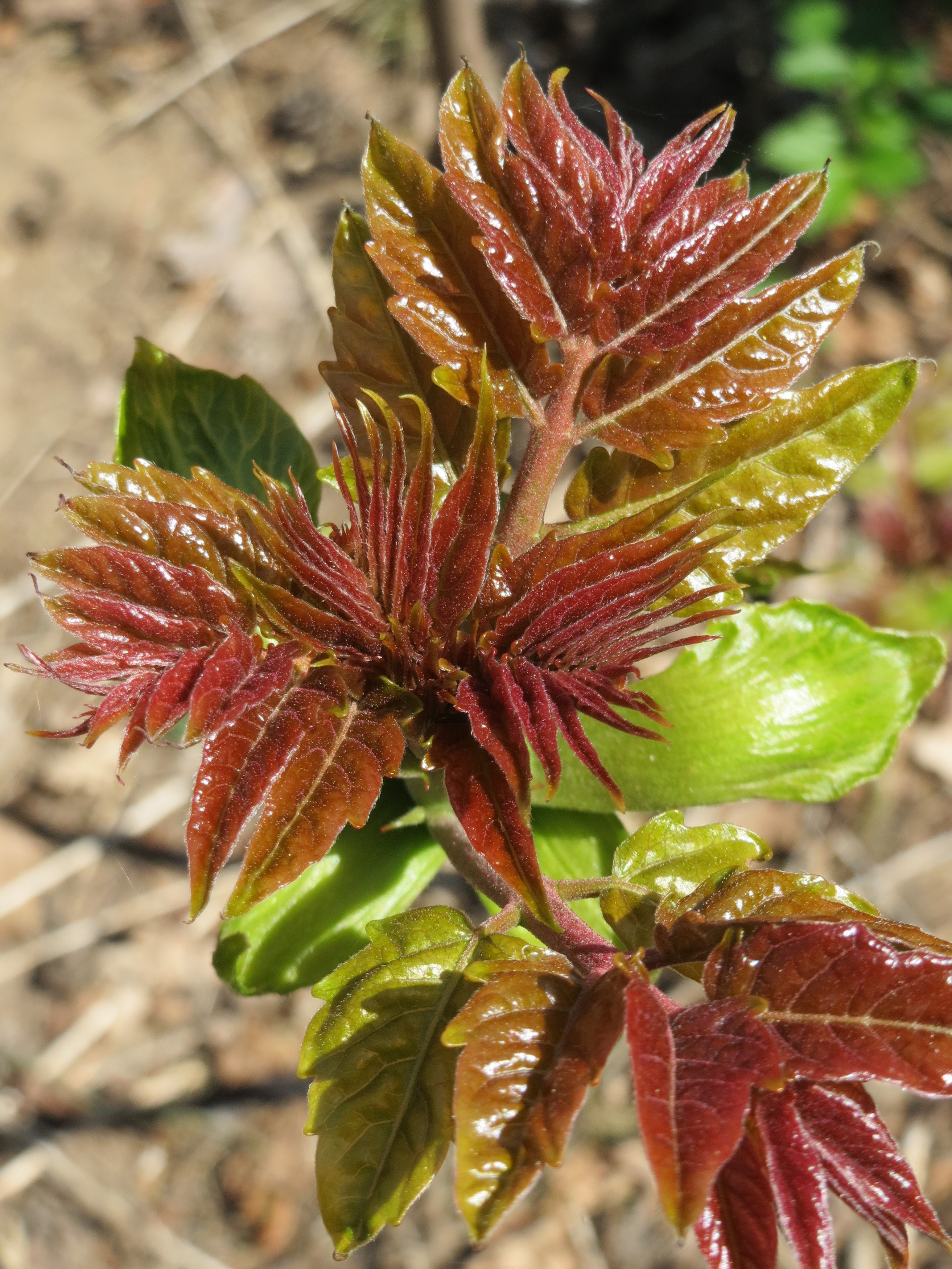 Götterbaum (Ailanthus altissima) im Schwetzinger Hardt